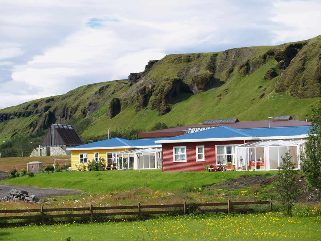 Kirkjubæjarklaustur in South Iceland